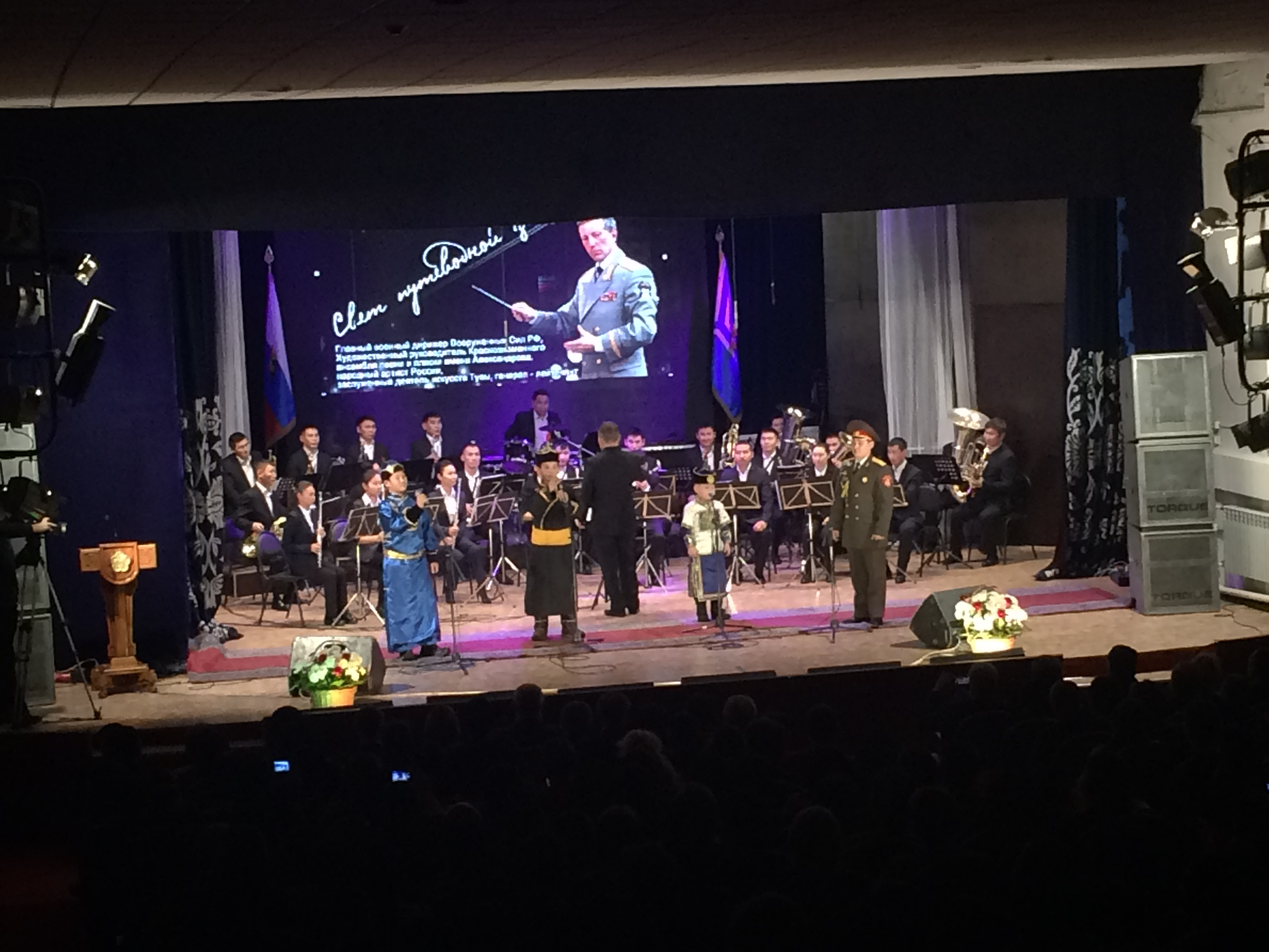 Вечер памяти Халилова Валерия Михайловича. Республика Тыва. В тот вечер Дому филармонии Республики Тыва было присвоено имя Валерия Михайловича Халилова